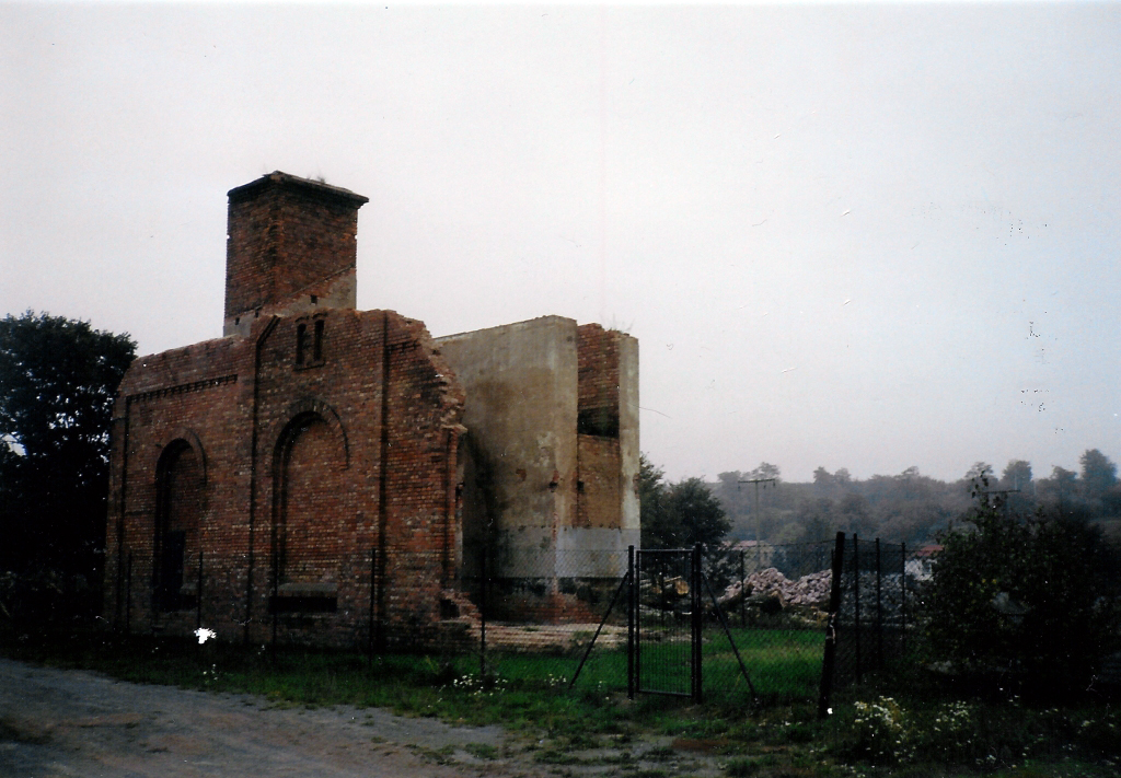 Förderanlage des Kalischacht 5 in Groß-Schierstedt. Heute ein Denkmal.